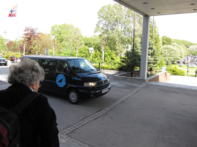 Natteravnene på dagtid.